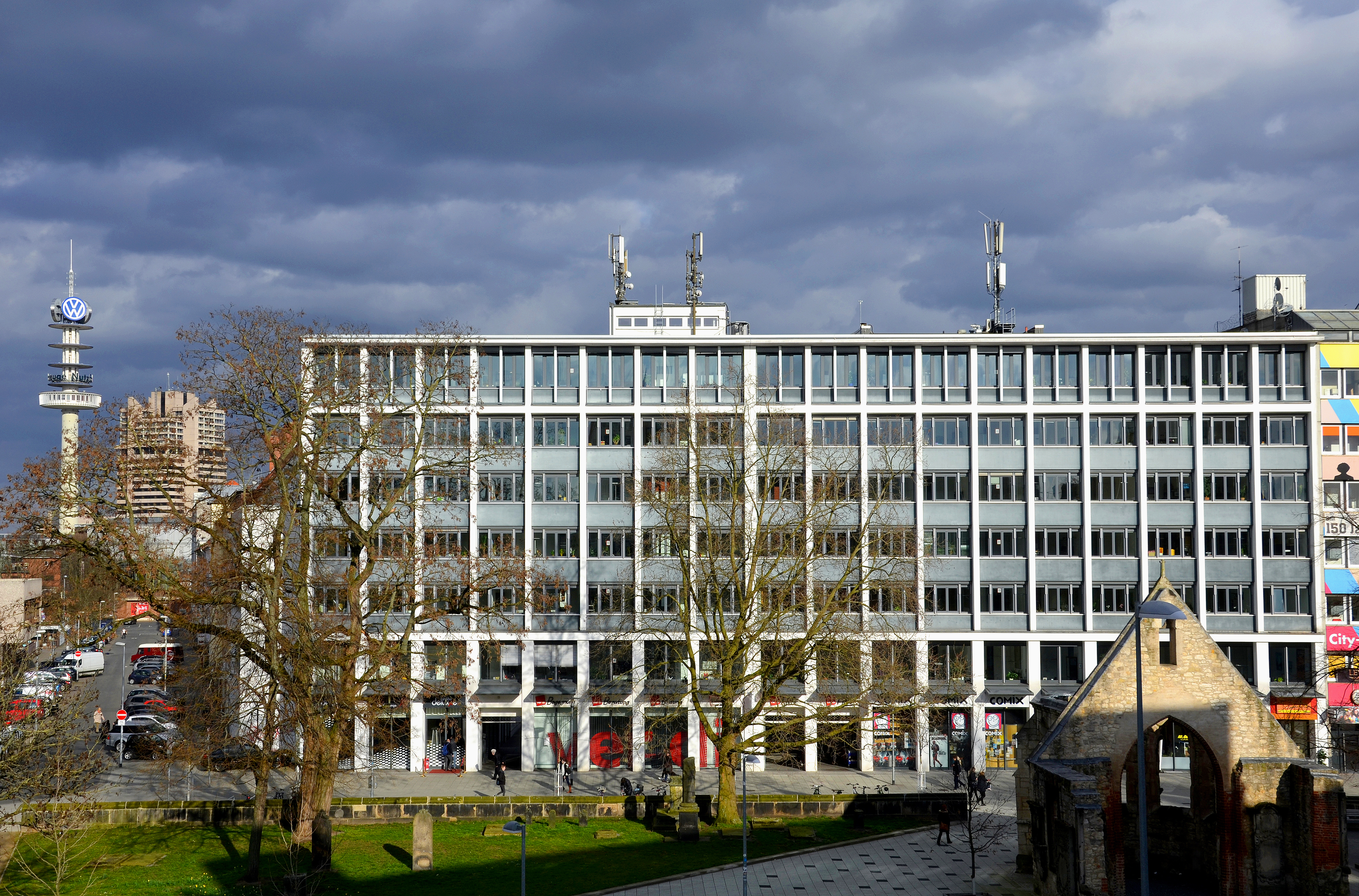 Blick vom Wikipedia-Büro Hannover über die Goseriede über einen Teil der Grünfläche des Alten St.-Nikolai-Friedhofs mit der denkmalgeschützten Ruine der Nikolaikapelle (im Vordergrund rechts) auf den Komplex des Büro- und Veranstaltungsgebäudes ver.di-Höfe, in dem neben der Gewerkschaft ver.di auch das Bildungswerk ver.di seinen Sitz hat. Das Foto zeigt im Hintergrund links hinter dem Ende der Brüderstraße den ehemaligen Fernsehturm Hannovers, den heutigen VW-Tower, rechts daneben das Hochhaus Lister Tor ...